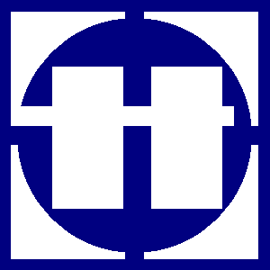 Zusätzliches Horten-Logo, mit dem ab den 1960er Jahren unter anderem die Warenhäuser beflaggt wurden. Es wurde zusätzlich auch in der Werbung benutzt, bis es von der Hortenwabe abgelöst wurde. Meistens über dem Hortenschriftzug angebracht, auf den Supermarkt Einkaufswagen aber zum Beispiel auch vor dem Namenszug.